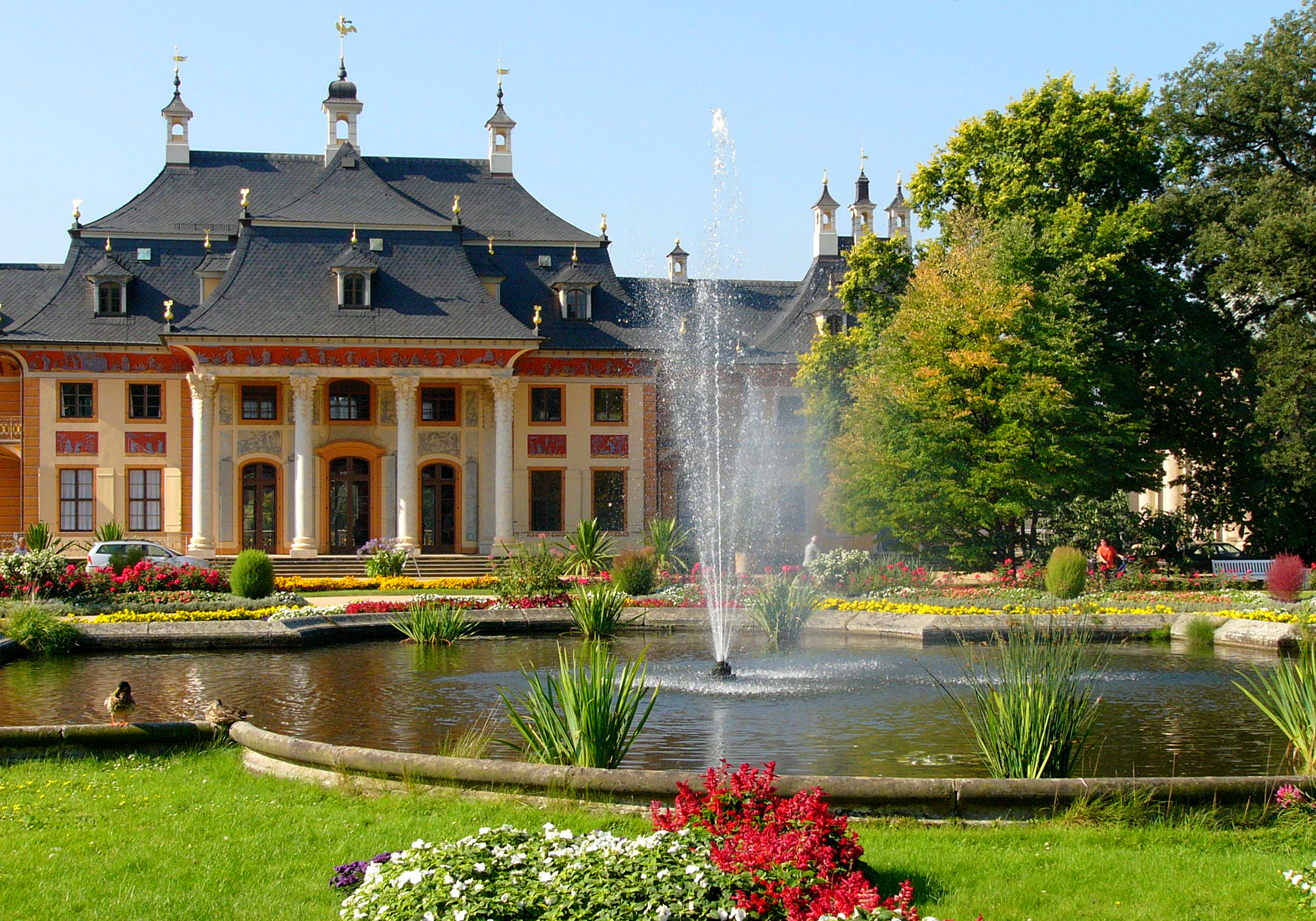 Pillnitz Castle with garden near Dresden, Germany